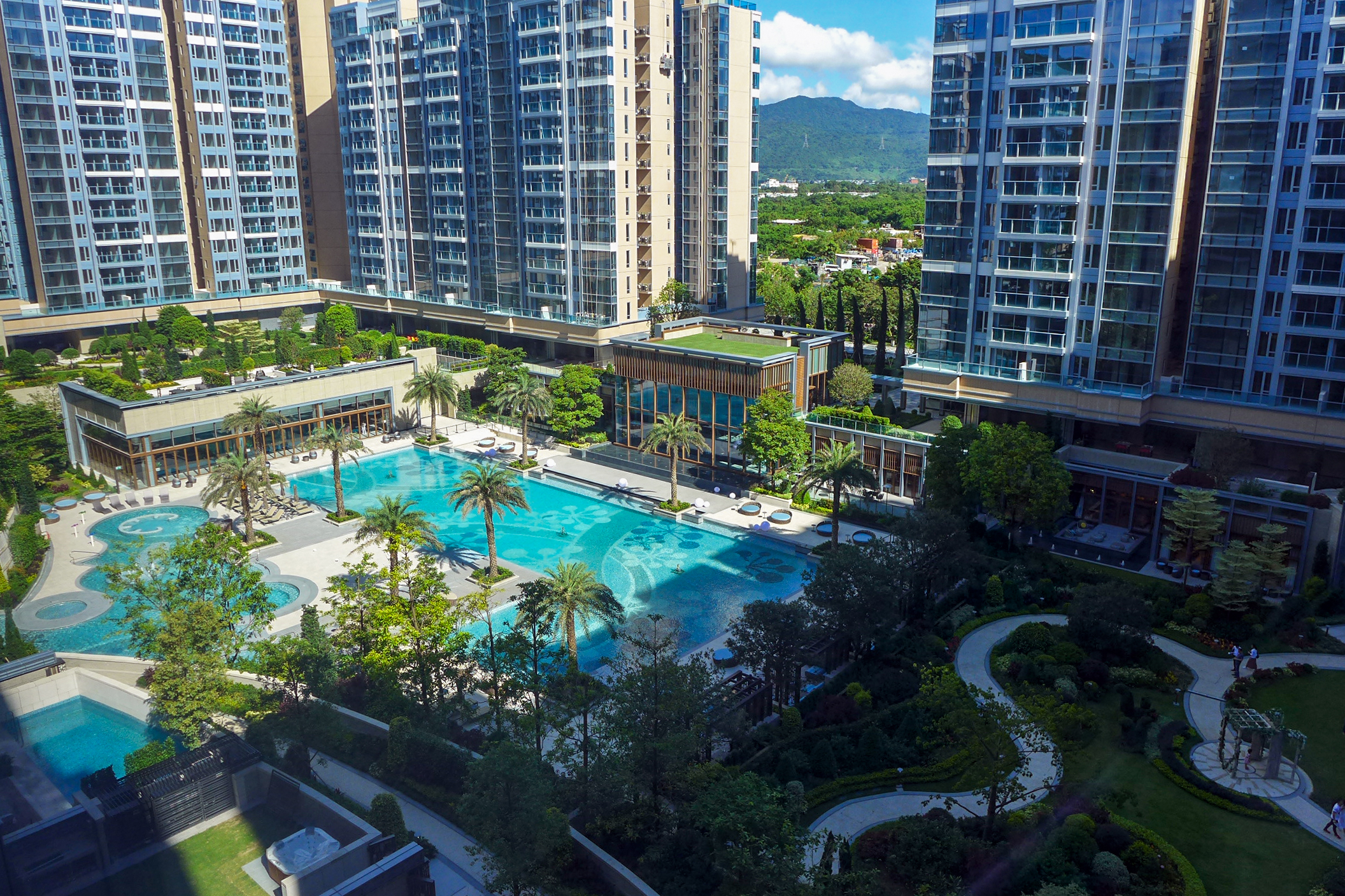 Park Yoho Venezia Garden